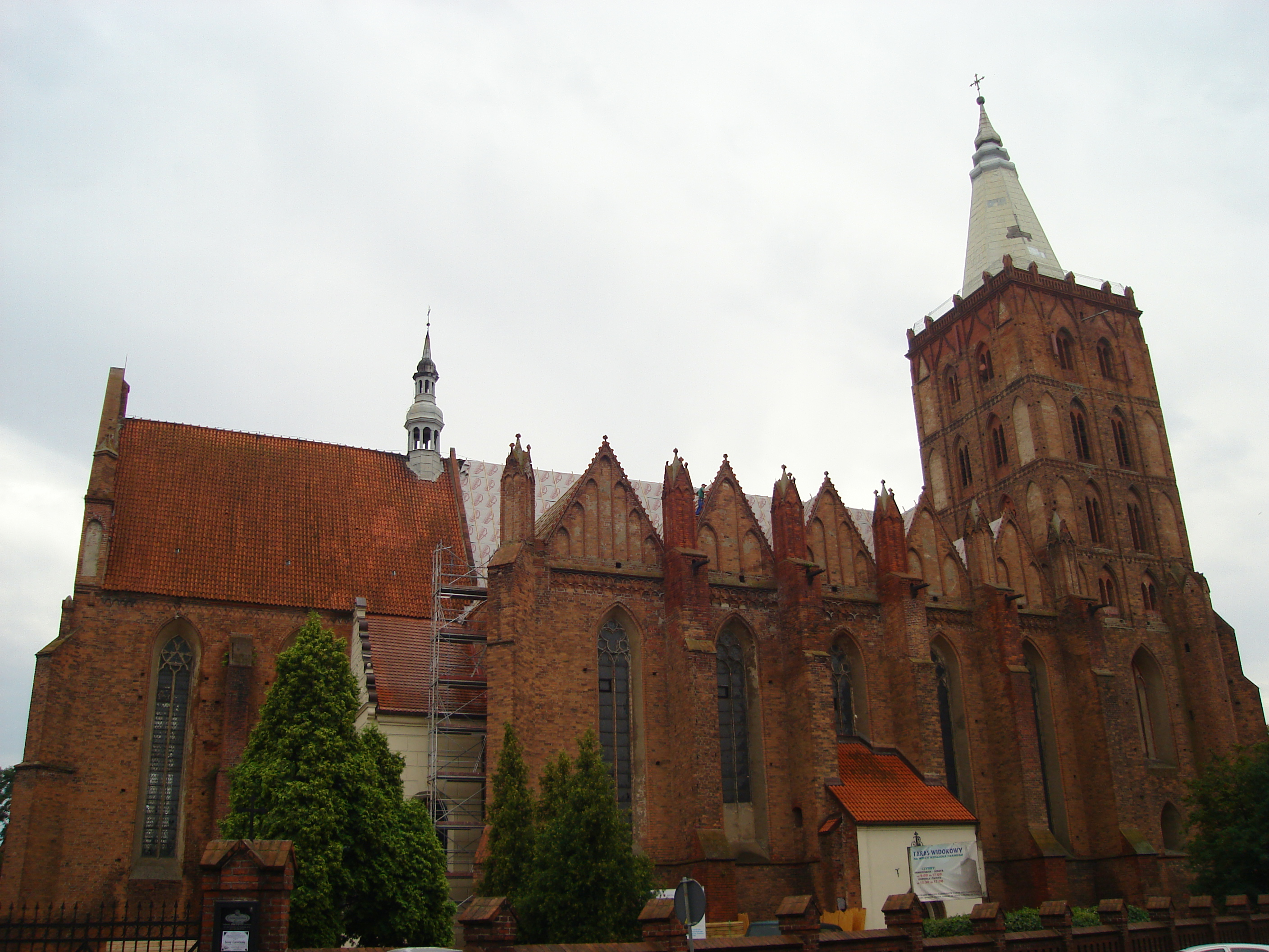 kościół farny p.w. Wniebowzięcia NMP,chełmno